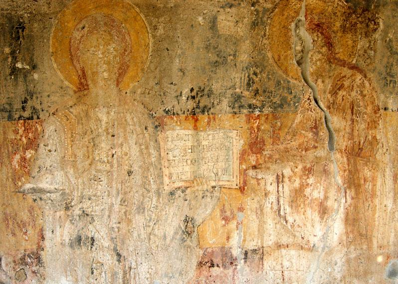 Стенопис от църквата Успение Богородично в костурското село Долени.